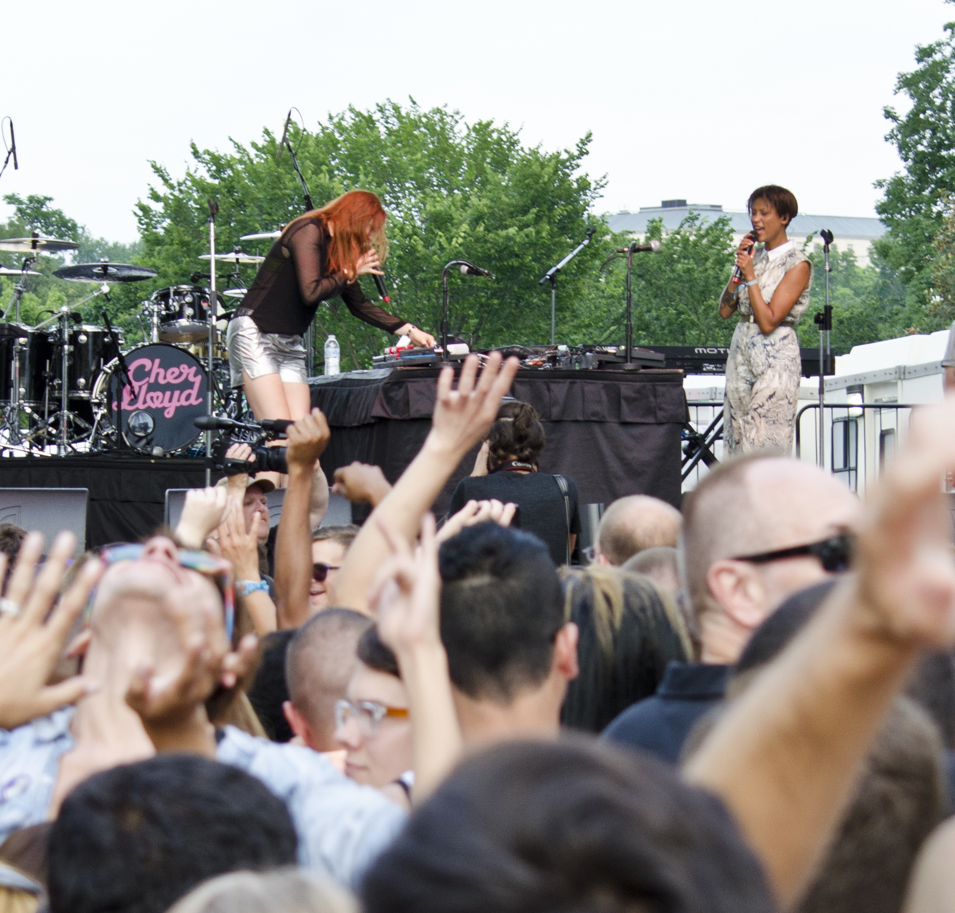 Icona Pop 008 - DC Capital Pride street festival - 2013-06-09